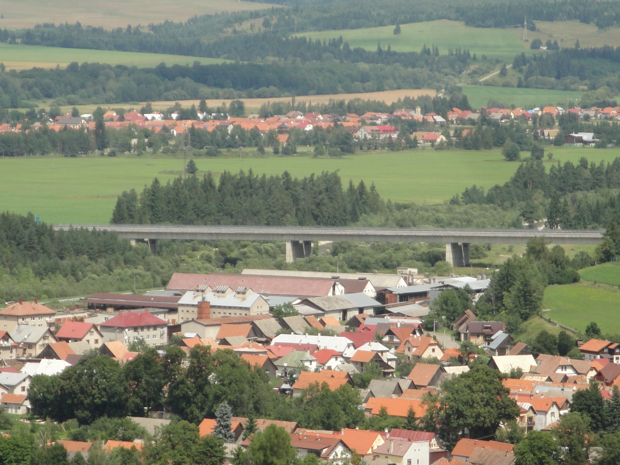 Most Belá je diaľničný most na Slovensku.